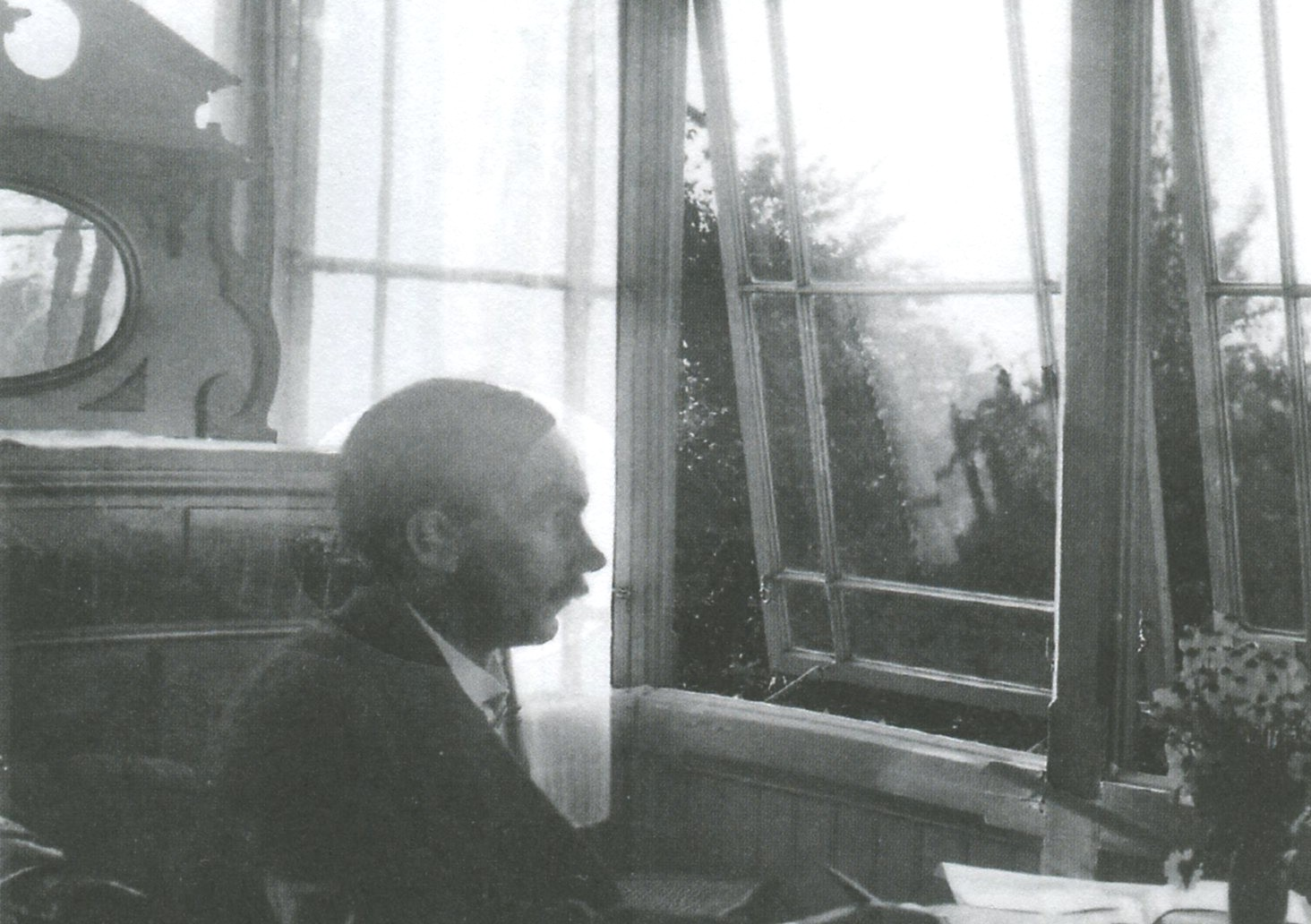 Arkitekt och möbelformgivaren Ernst Spolén